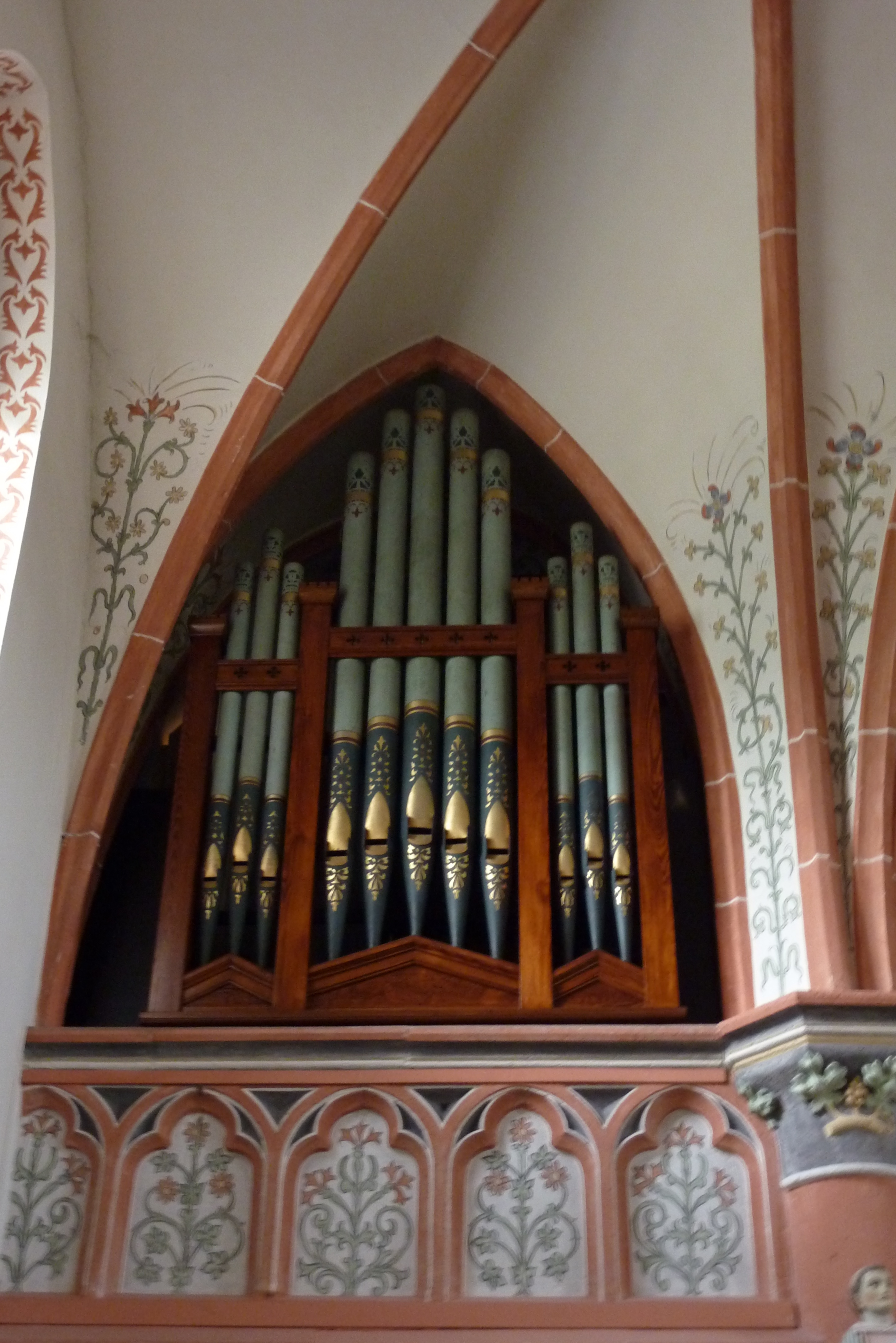 Katholische Pfarrkirche St. Michael in Reifferscheid, Orgel